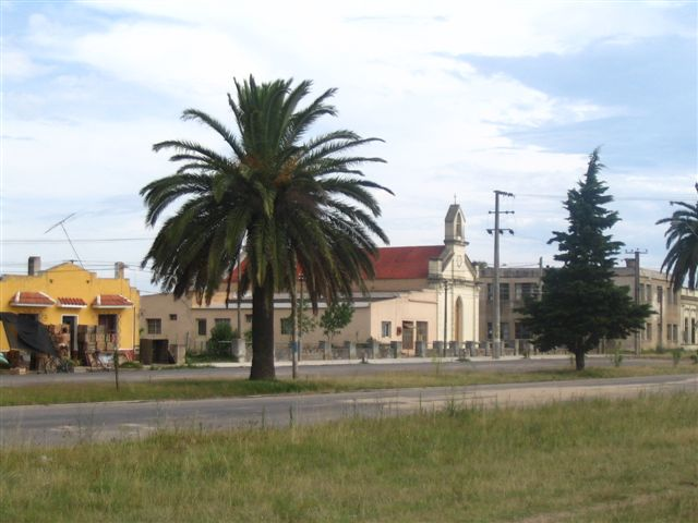 Sobre la calle principal de Cerro Chato (Uruguay) Parroquia y en el fondo el Club Democrático